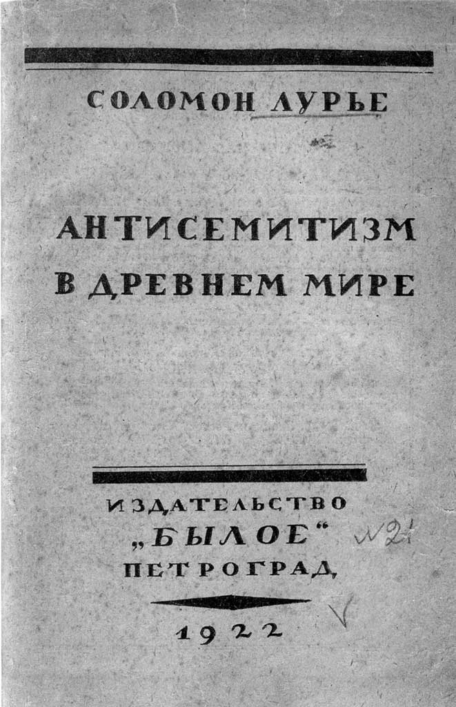 Обложка первого издания книги С. Я. Лурье Антисемитизм в древнем мире. Попытки объяснения его в науке и его причины